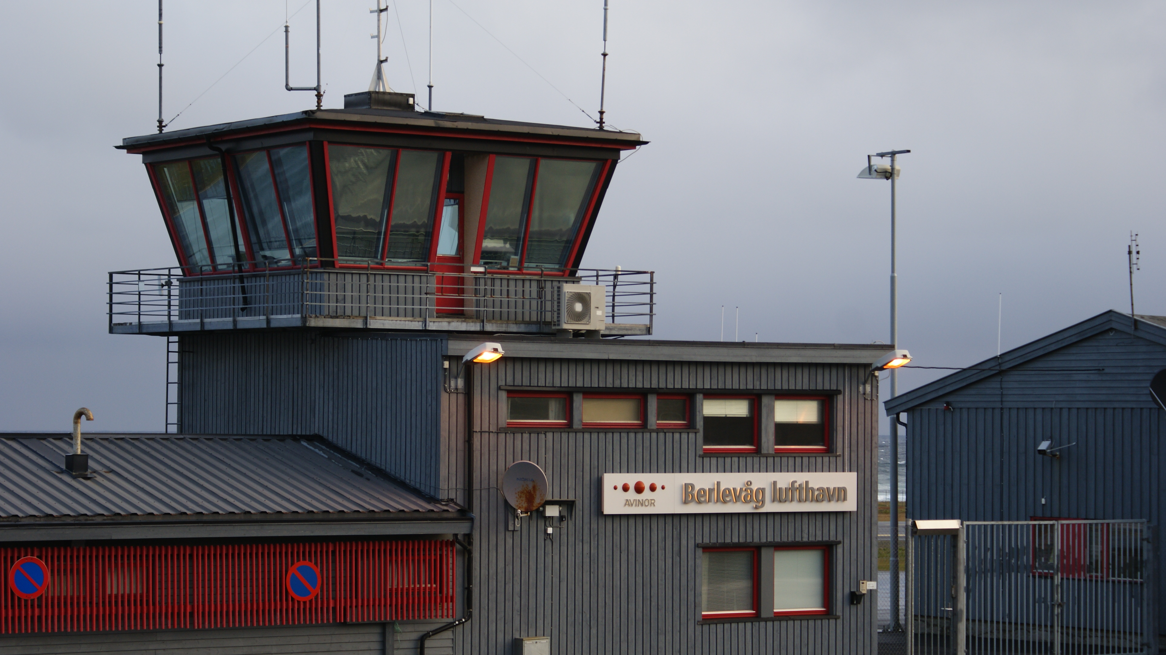 Berlevåg Airport, Varangerhalvøya, Finnmark, Norway.